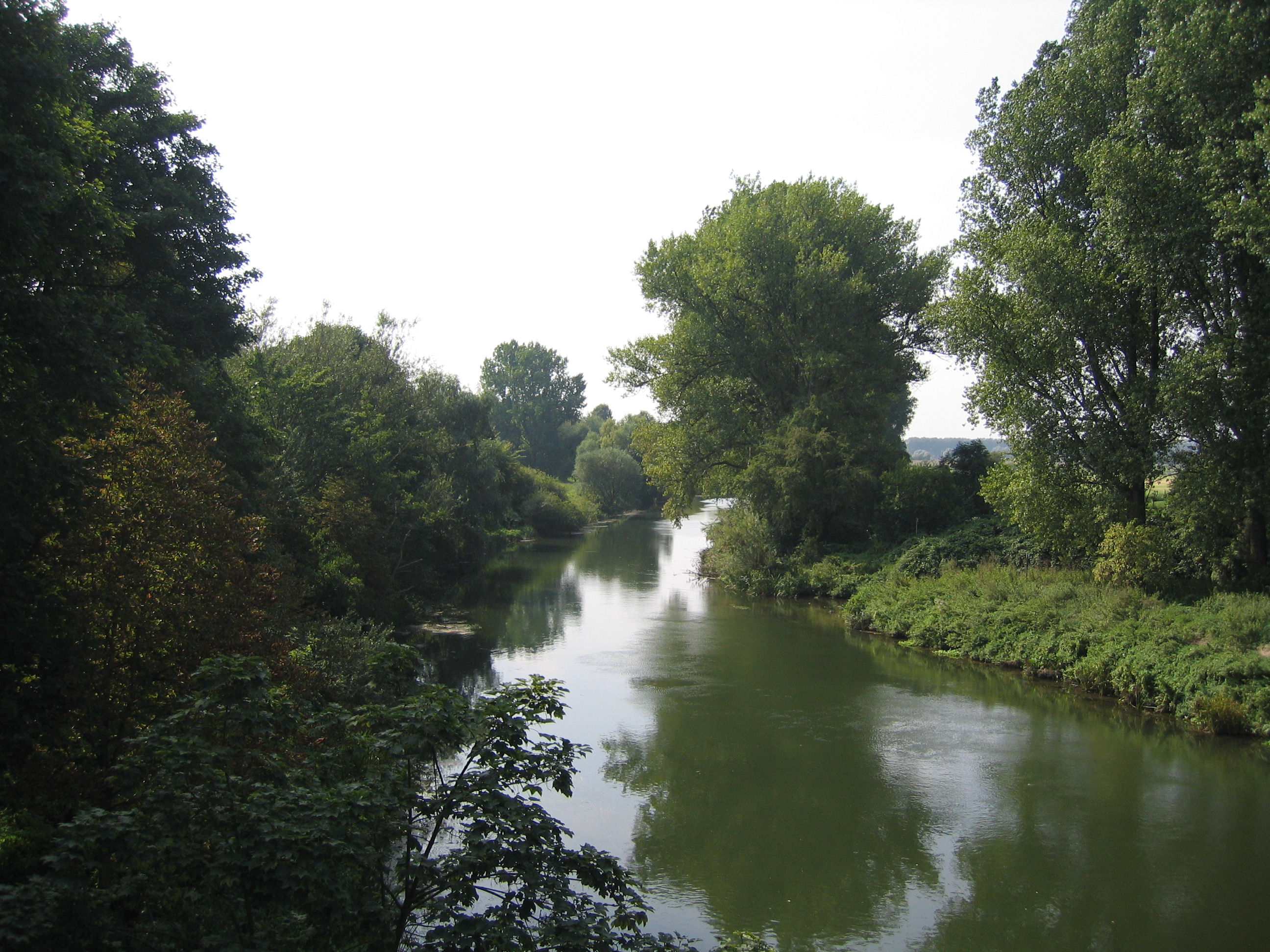 Lippe im Naturschutzgebiet „Lippeaue von Werne bis Heil“ (NSG UN-055) zwischen Bergkamen (links im Bild) und Werne (rechts); die Flussmitte bildet die Gemeindegrenze. Das Bild zeigt die Lippe in Fließrichtung, aufgenommen von der Brücke der B223 (Kamener Straße). An dieser Stelle (etwas rechts der Bildmitte) mündet die Horne (Hornebach) in die Lippe.